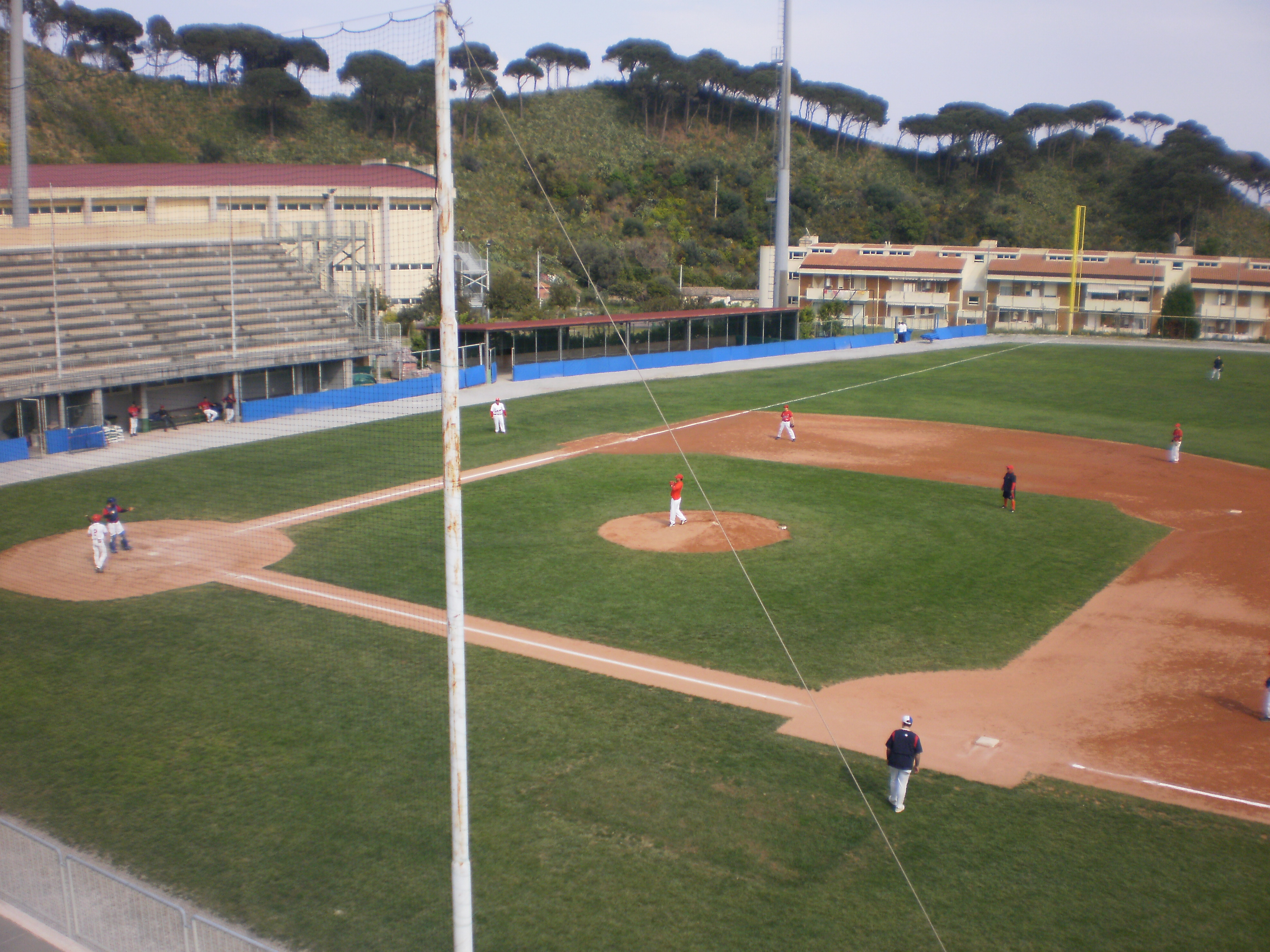 Veduta dello Stadio Primo Nebiolo di Messina.